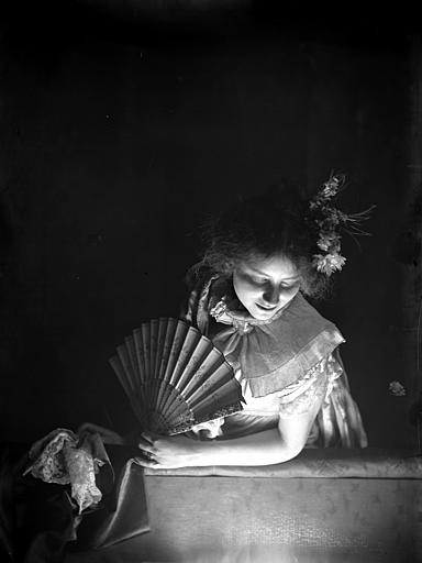 Mise en scène d'un modèle féminin, intérieur: jeune fille accoudée avec un éventail dans la main, regardant vers le bas, effet de lumière